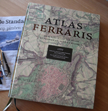 de Ferraris - Lannoo - Tielt - België